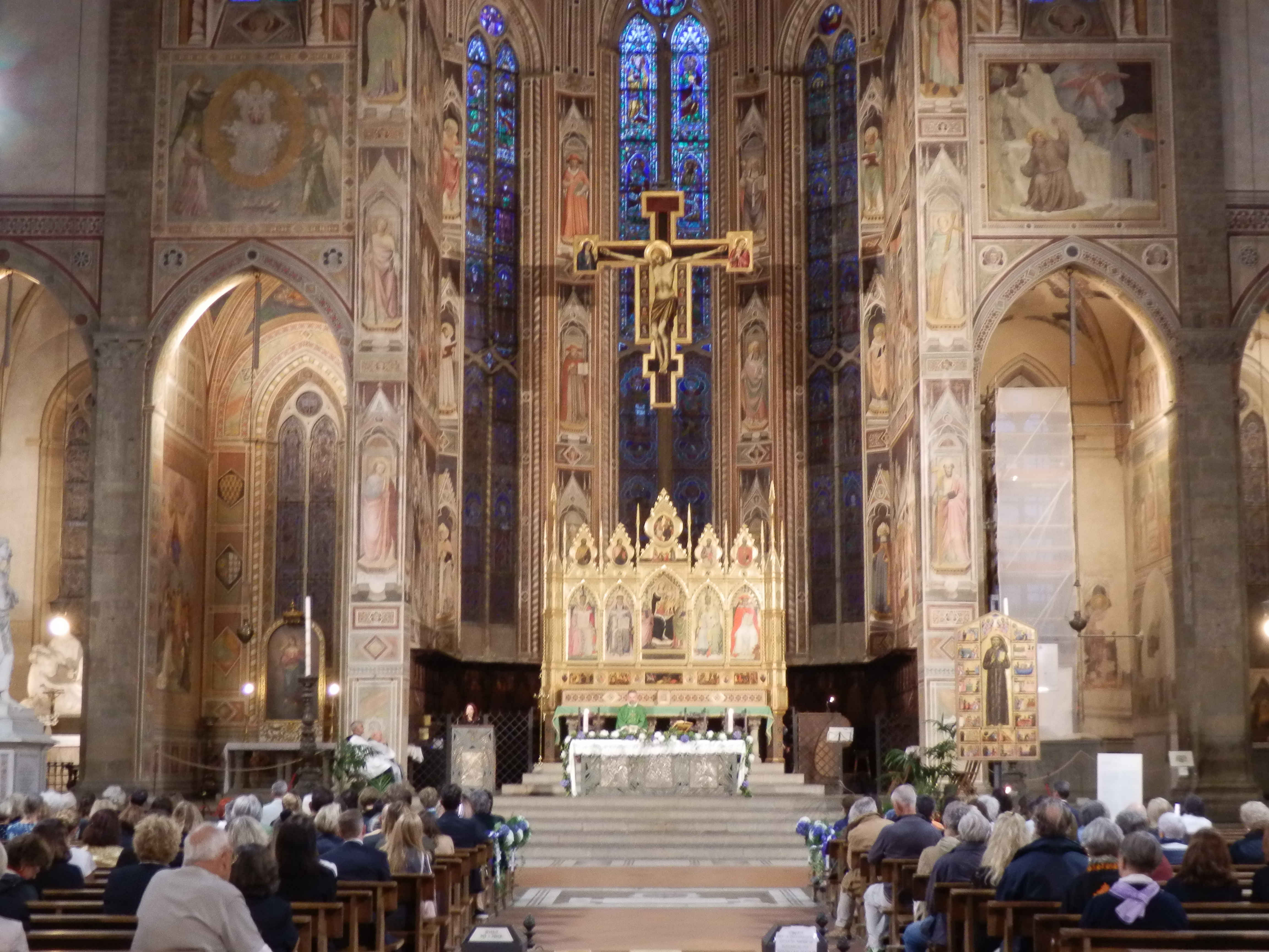 Messa in commemorazione di Jane Fortune, Basilica di Santa Croce